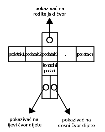 Slikoviti prikaz čvora T-stabla